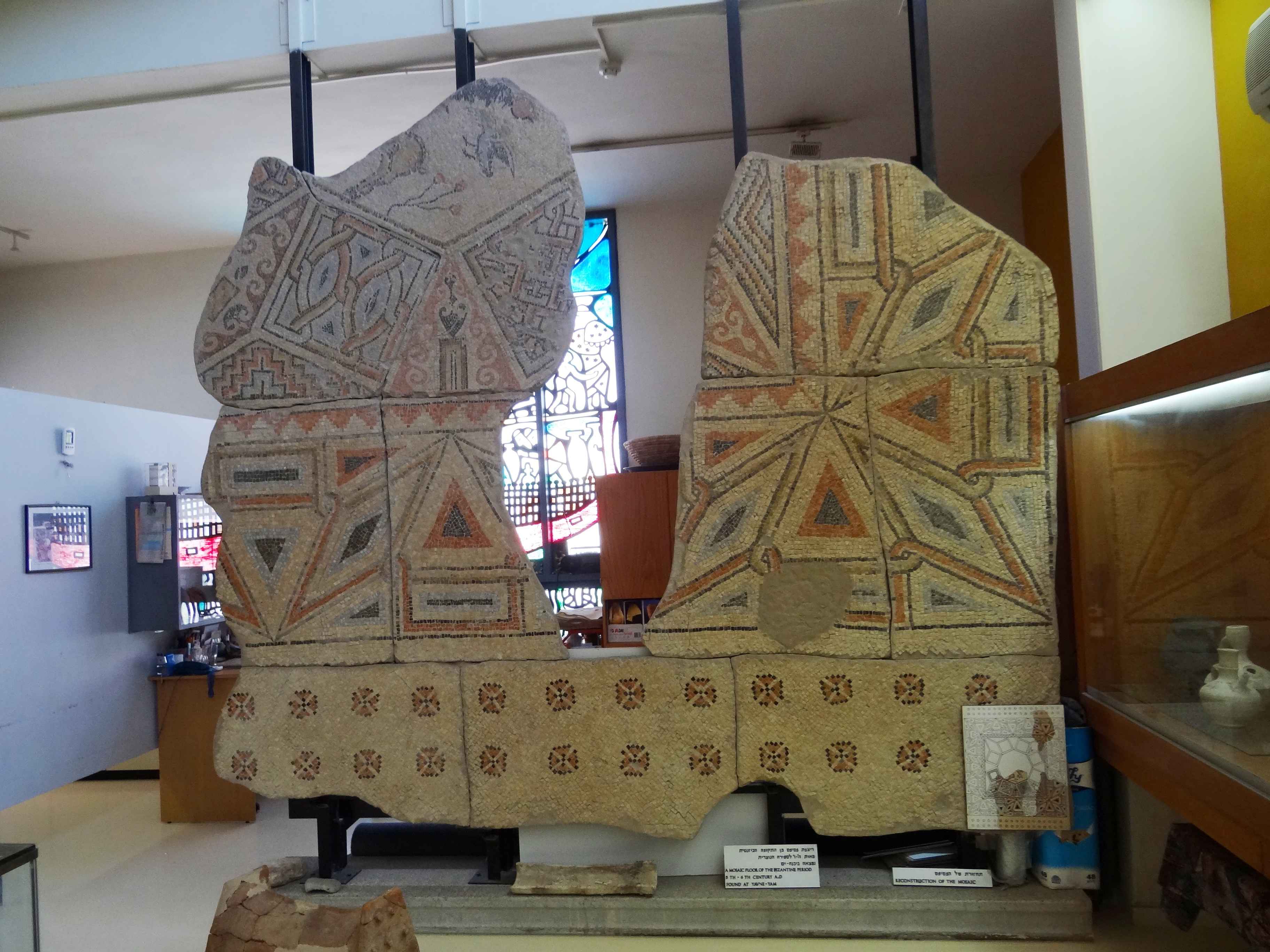 Archaeological Museum Beit Miriam in kibutz Palmahim, Israel מוזיאון בית מרים - הים ומלואו" הוא מוזיאון לארכאולוגיה השוכן בקיבוץ פלמחים מעל מצוק הצופה לים. המוזיאון מתרכז בממצאים ארכאולוגים שנחפרו באזור הקרוב לפלמחים, בחלקו התחתון של ערוץ נחל שורק וממצאים שנמשו מהים בקרבת הקיבוץ. רצפת פסיפס - מהתקופה הביזנטית מיבנה ים.